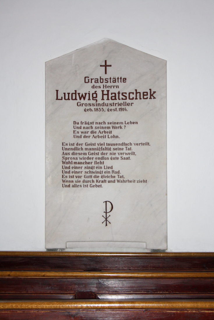 Grabstein von Ludwig Hatschek in der Wallfahrtskirche Maria Schöndorf